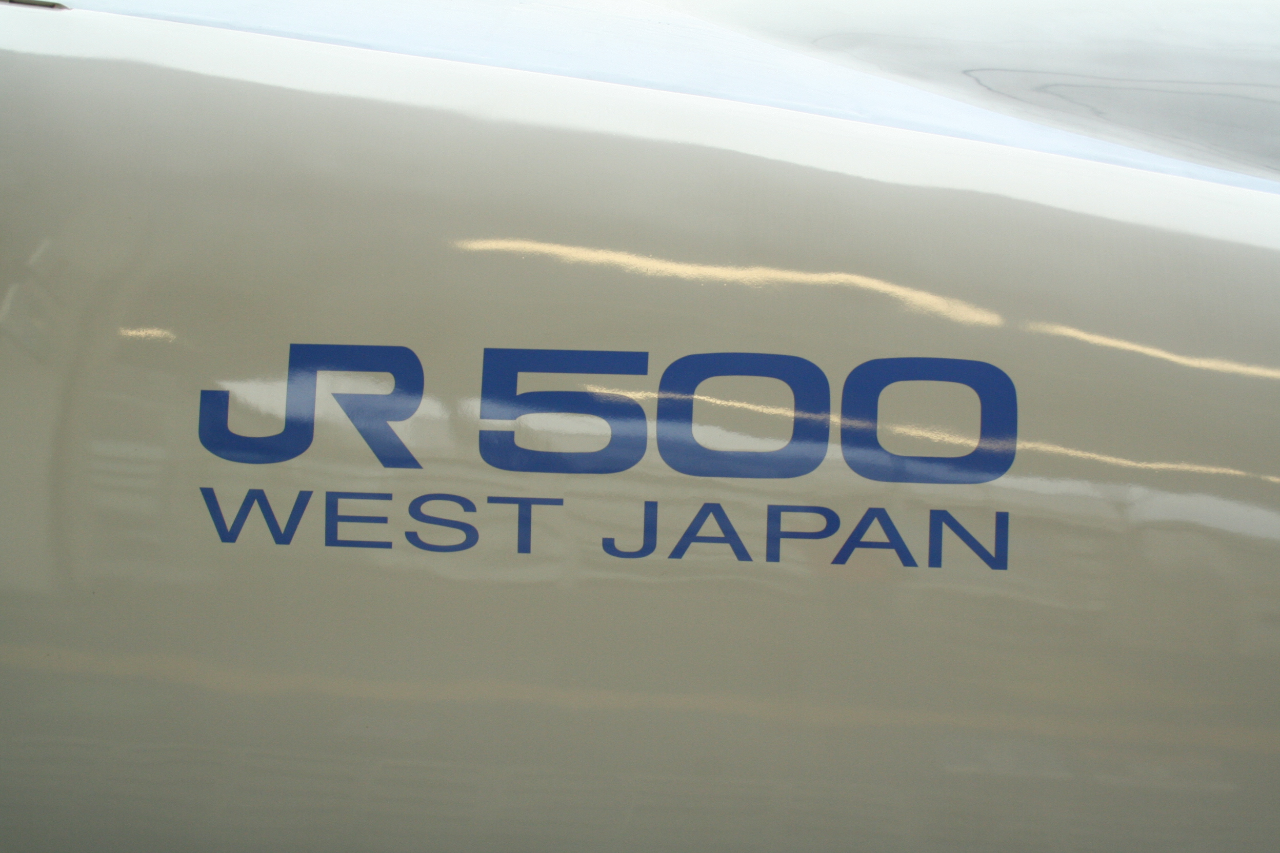 JR西日本の姫路駅。新幹線及びJRのホームなど。 44の列車の車体に書かれた名称。